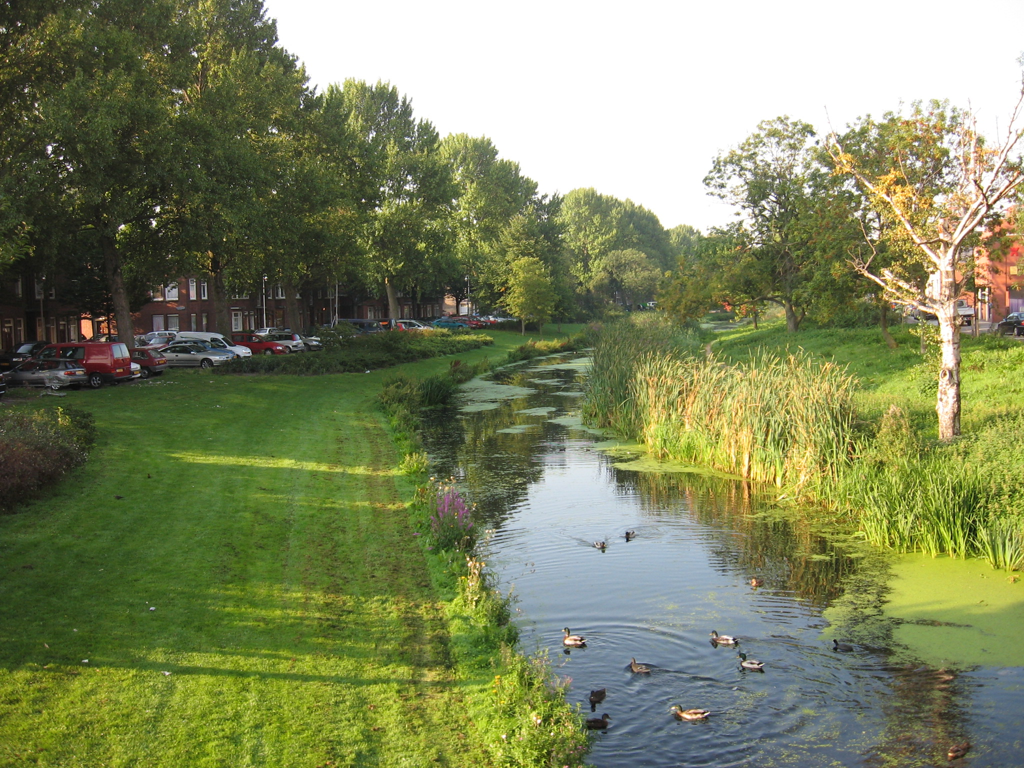 Laakkade, sept. 2006